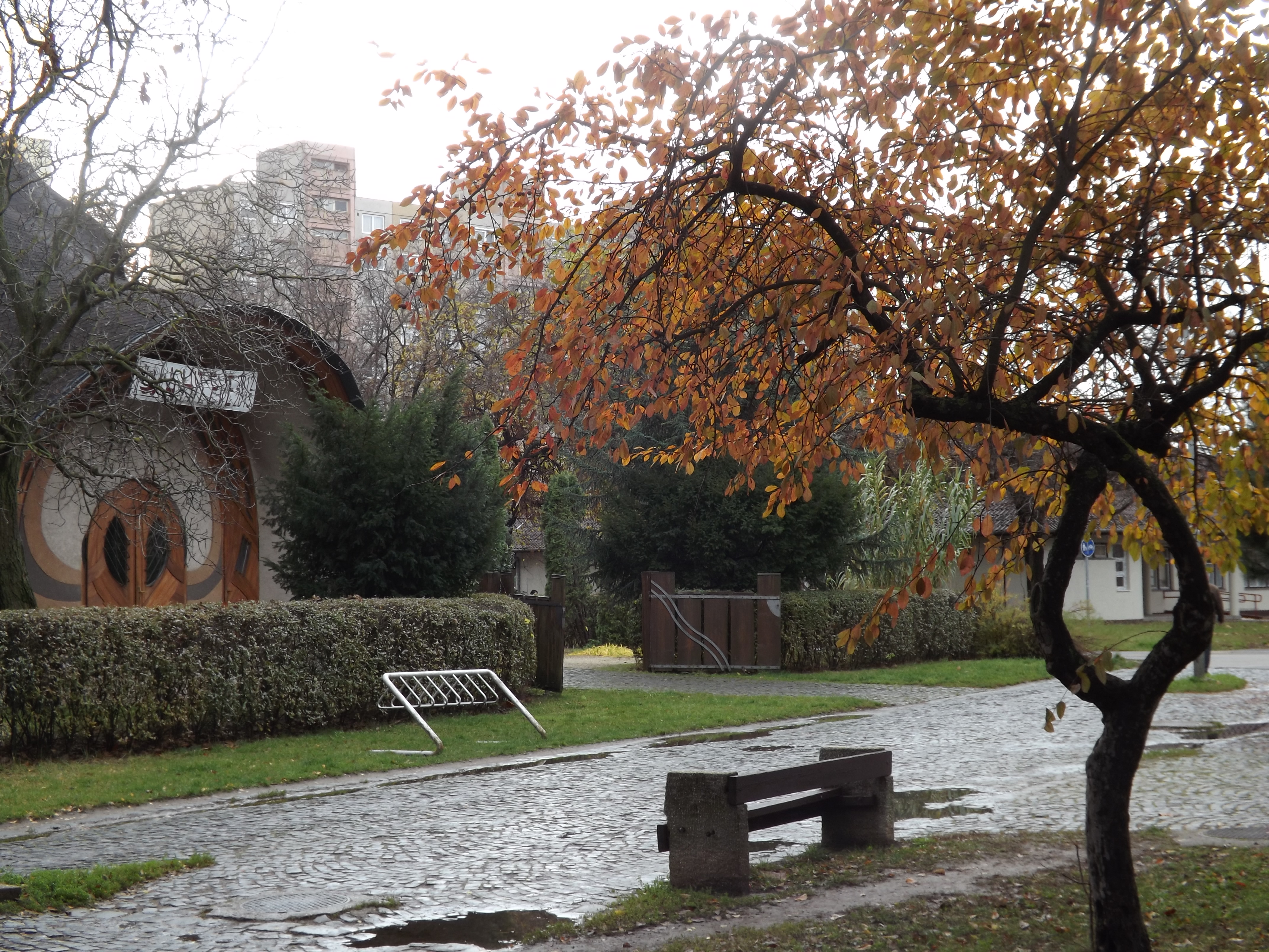 Debrecen, Tócóskert, Holló László sétány (részlet)